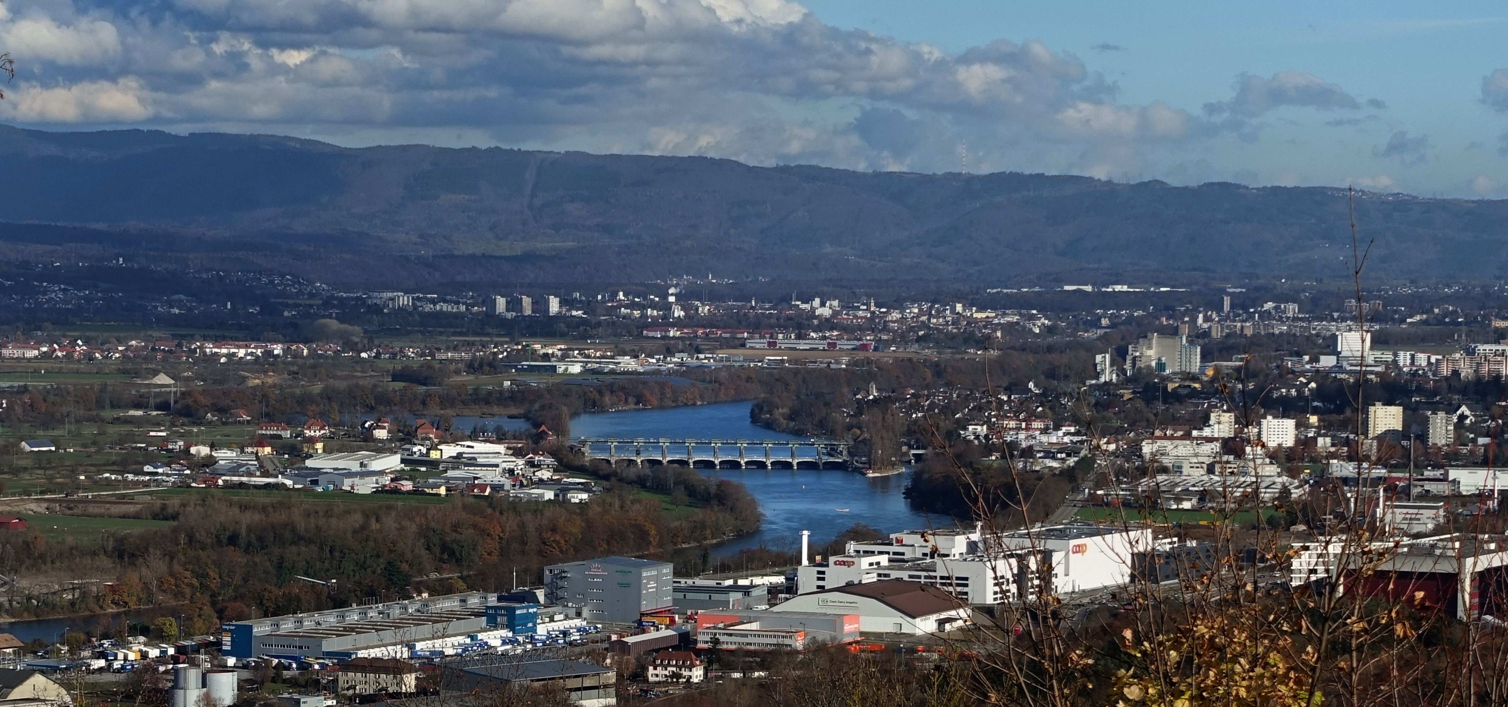 Panorama Blick von der vorderen Wartenberg Ruine in Muttenz zum Kraftwerk in Augst